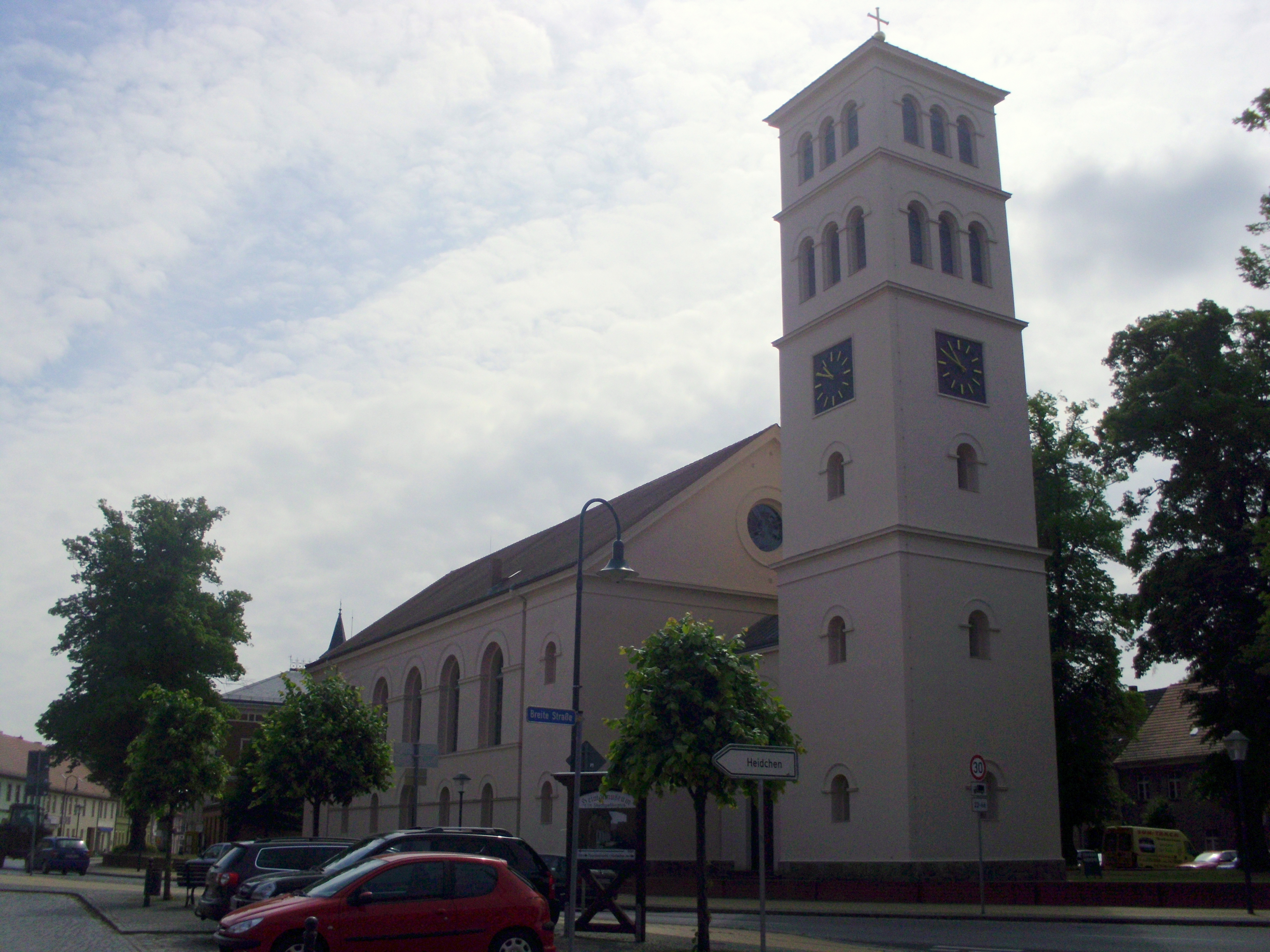 Stadtkirche Liebenwalde, Brandenburg, Germany